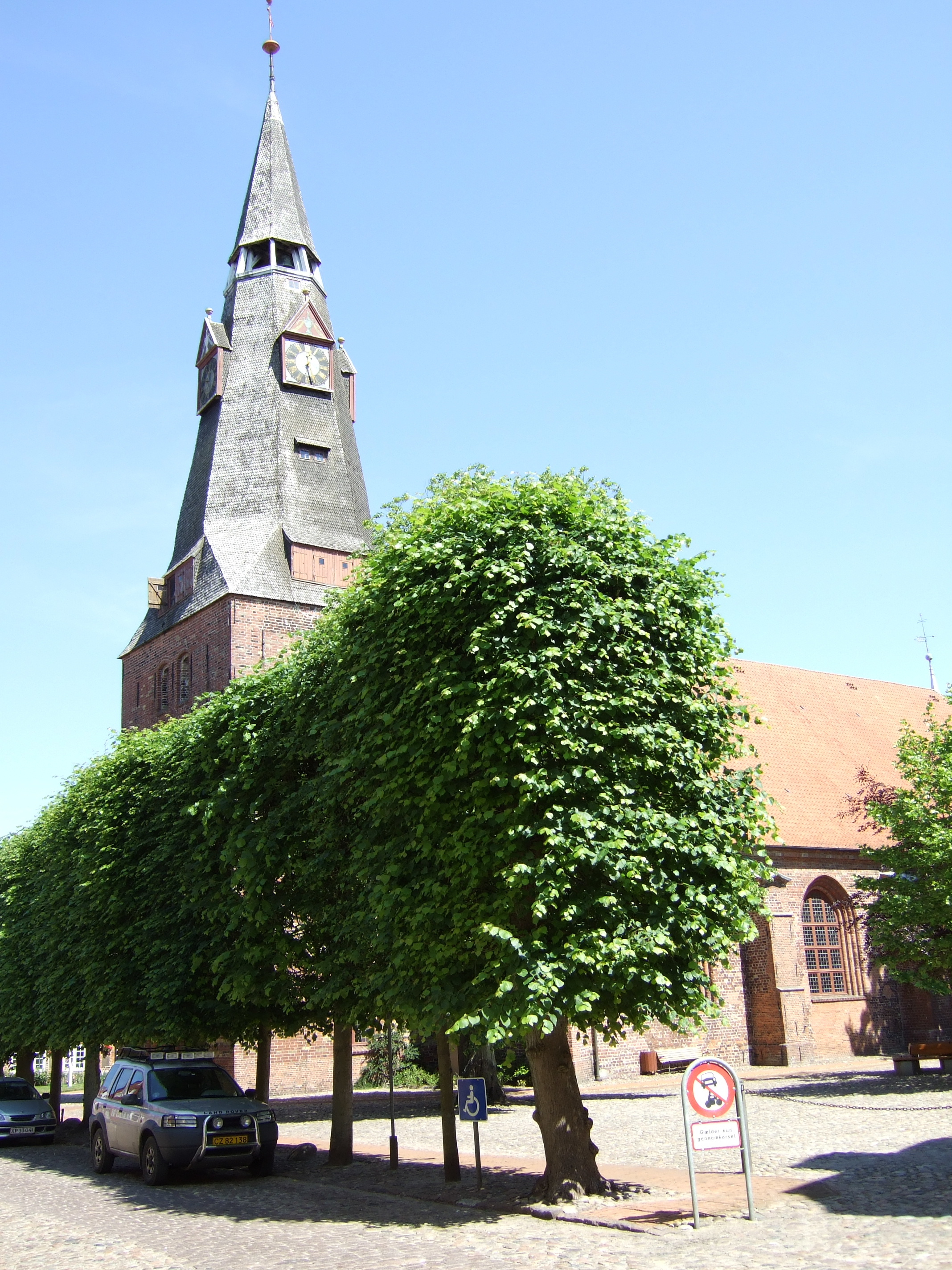 Christkirche in Tondern / Christ Church in Tønder / Tønder Kristkirke